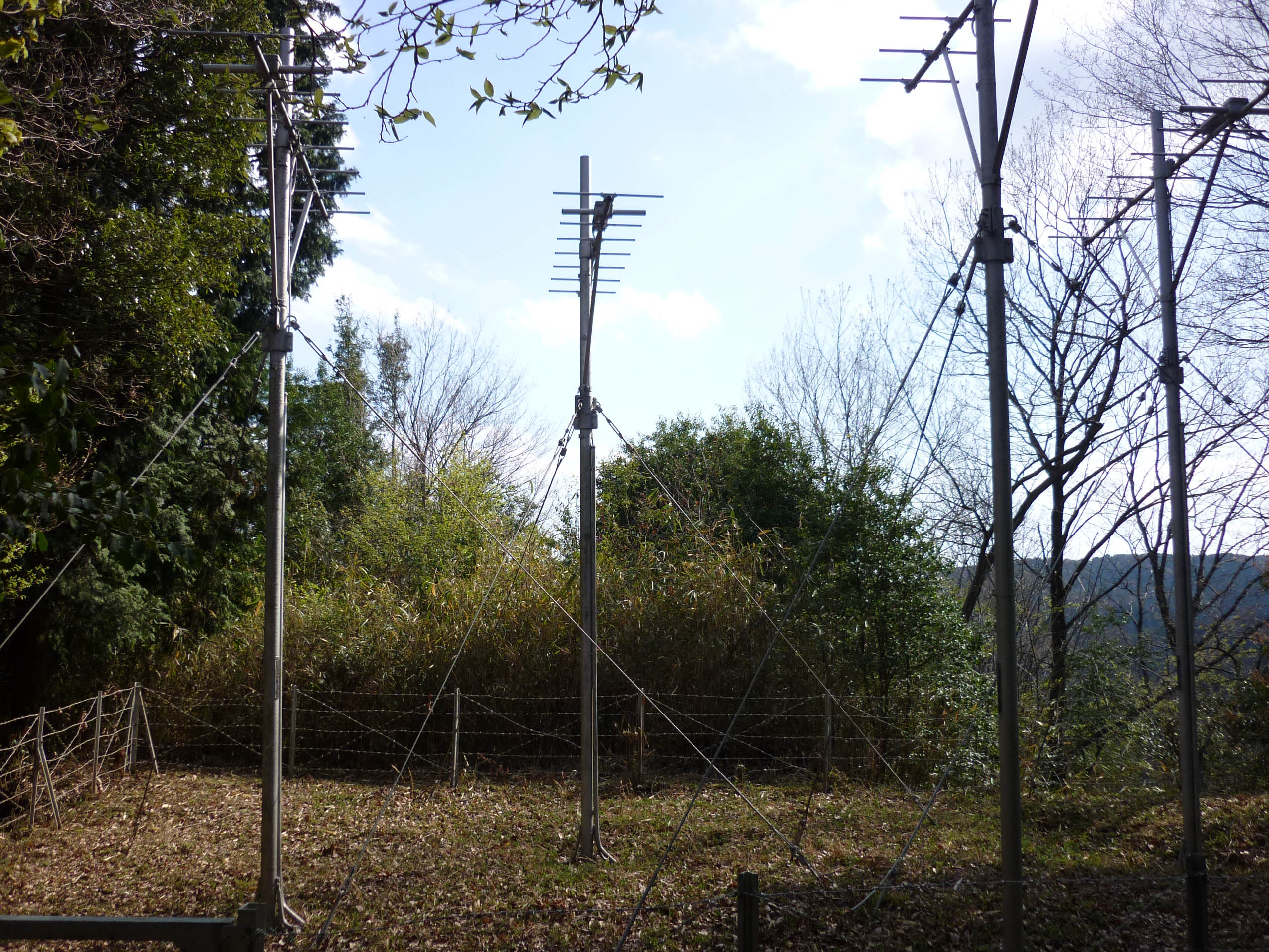 電波塔